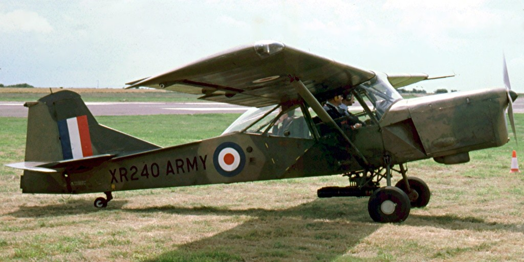 Auster AOP9 Serial Number XR240